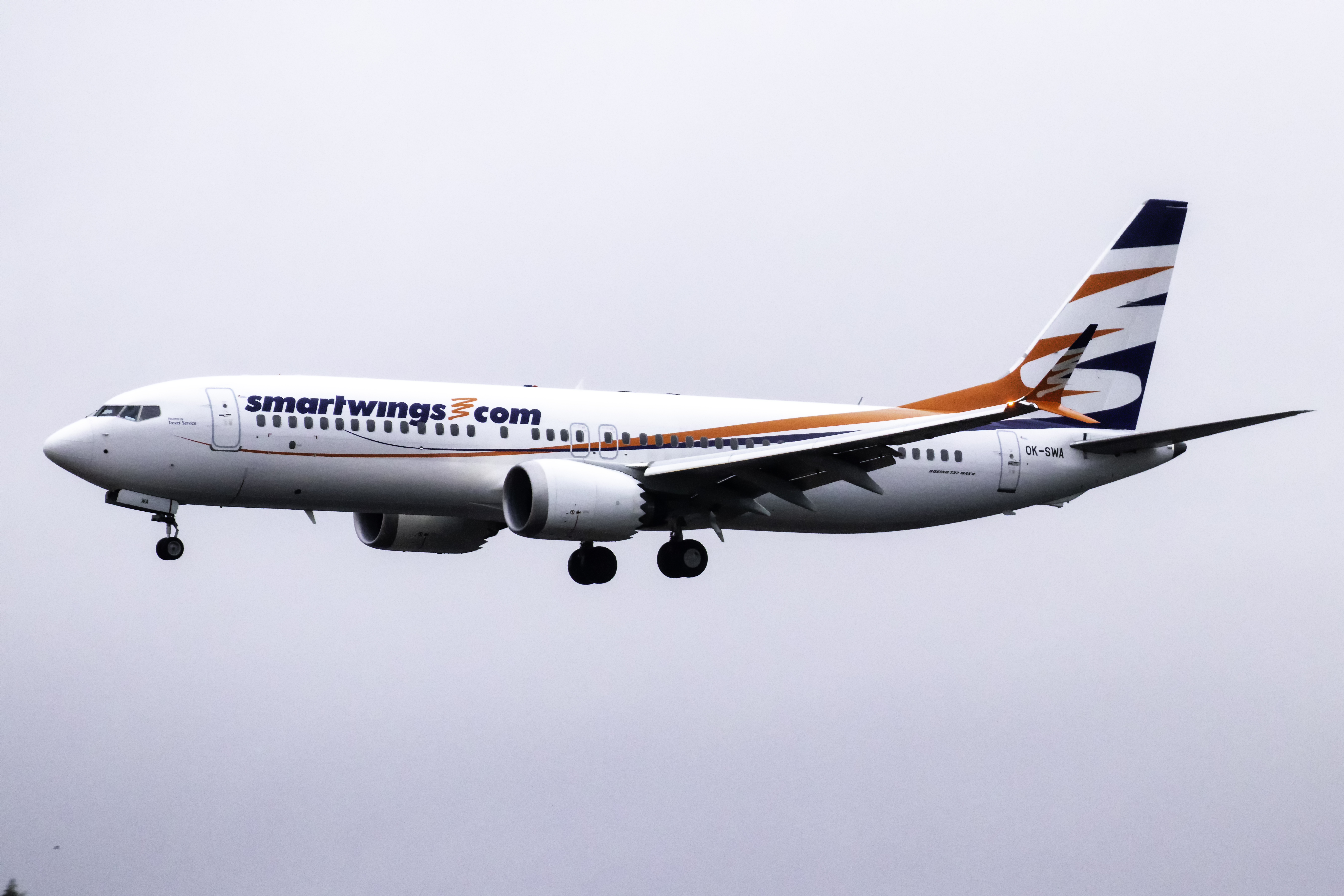 Boeing 737-8 MAX de Smartwings aterrando no aeroporto de Santiago de Compostela.